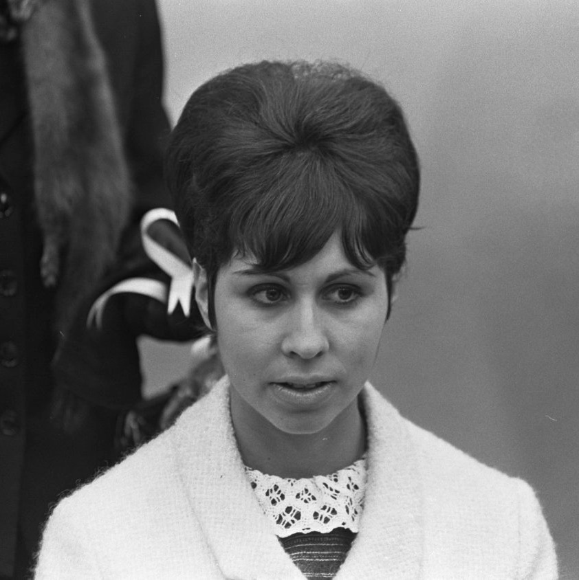 Petra Burka